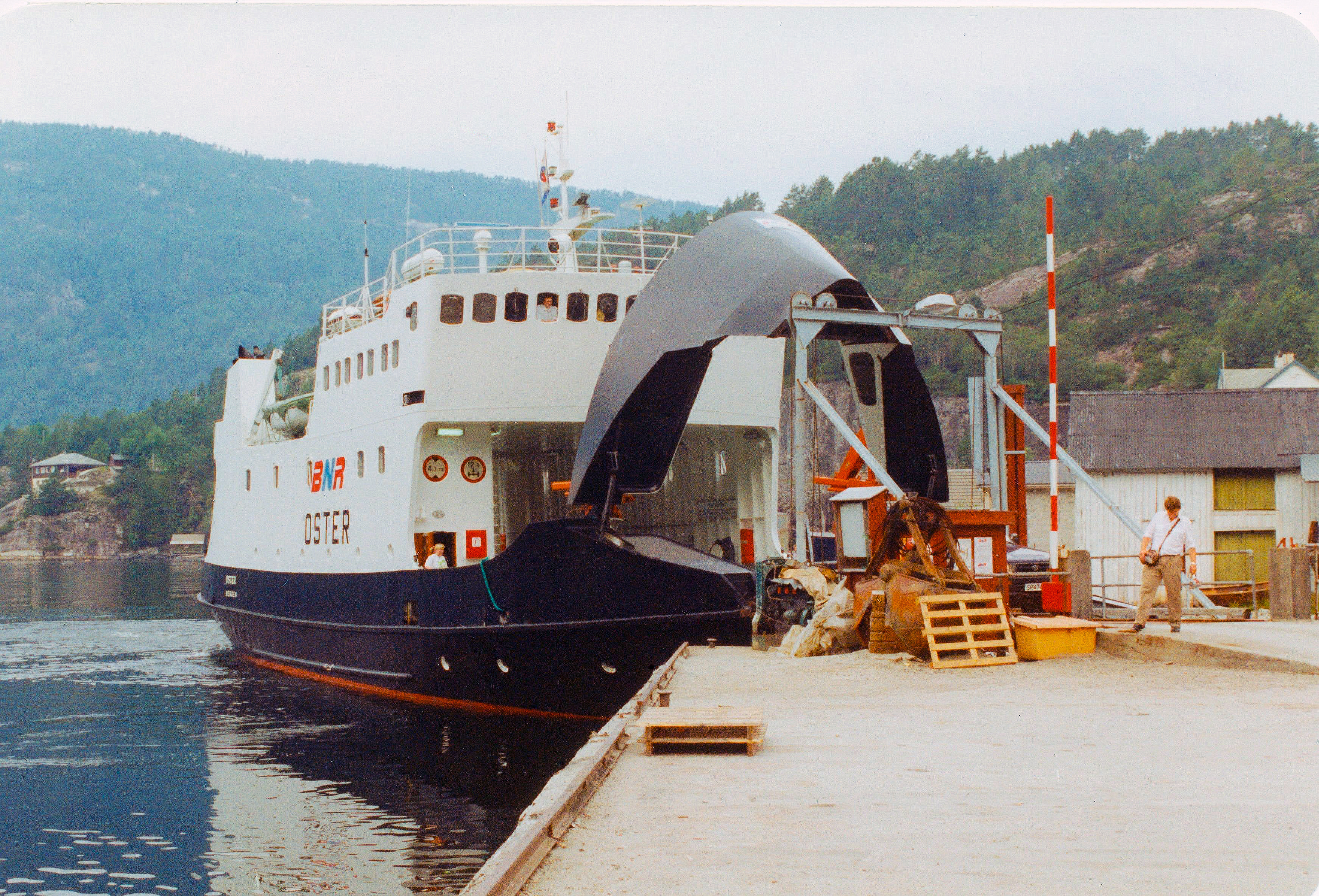 MF Oster ved Stamneshella i 1994. Foto Harald Sætre